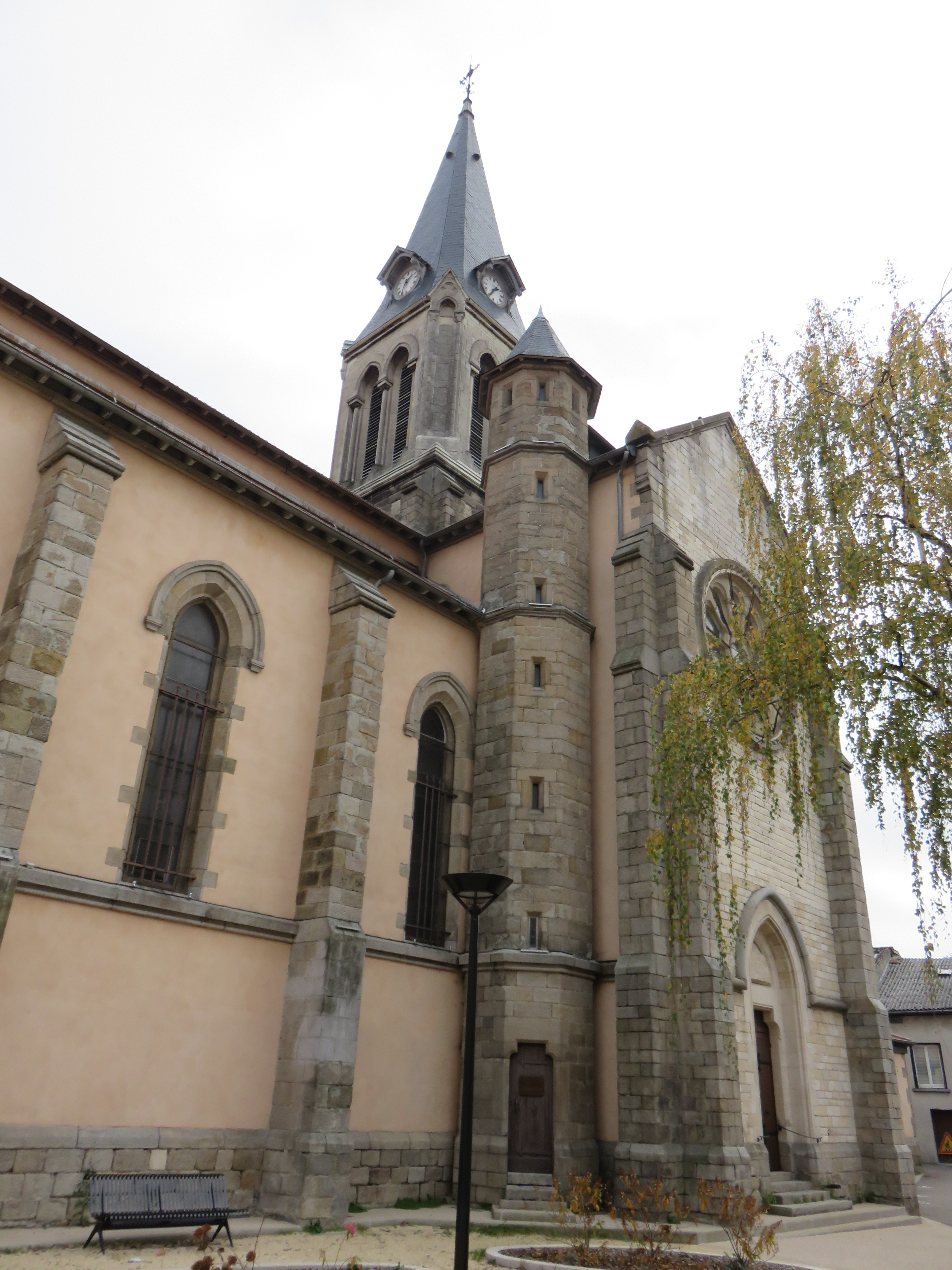 Clocher de l'église Saint-Clair de Brignais (Rhône, France).